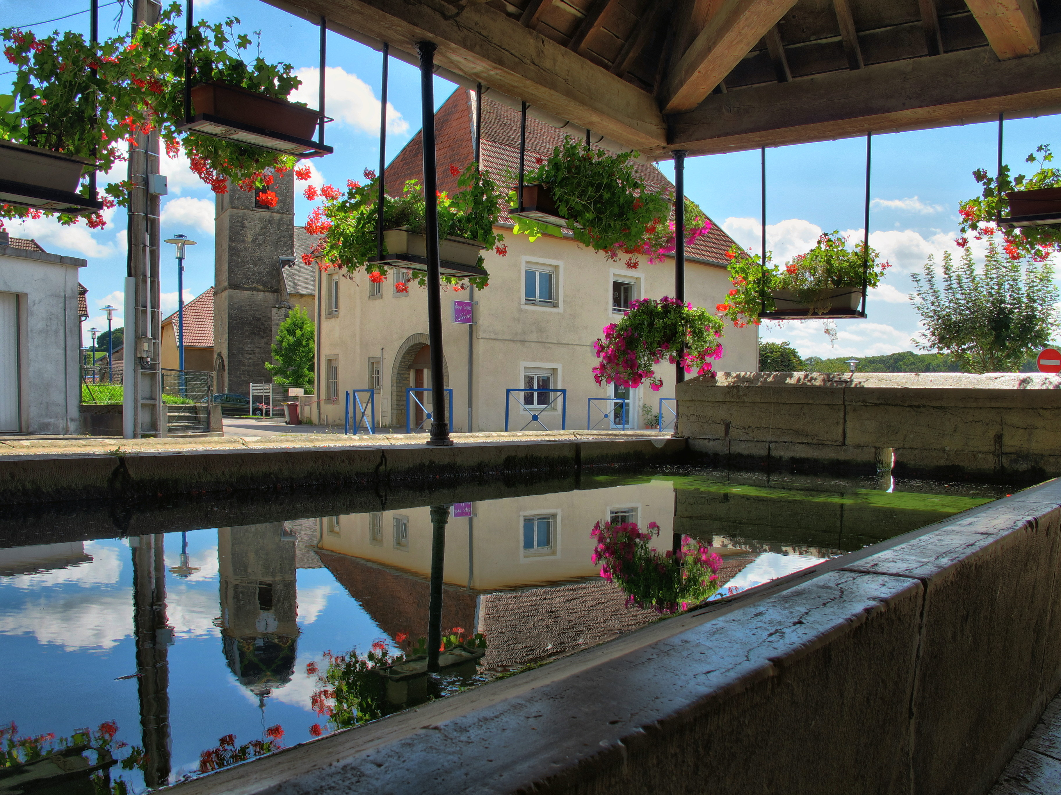 Reflet du clocher sur l'eau du lavoir-abreuvoir